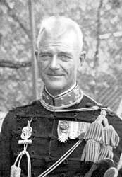 Generaal-majoor der genie GJF Statius Muller. Hij was oa. inspecteur van het wapen der genie (KNIL) in Nederlands-Indië.